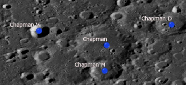 Cráter Chapman (LRO)